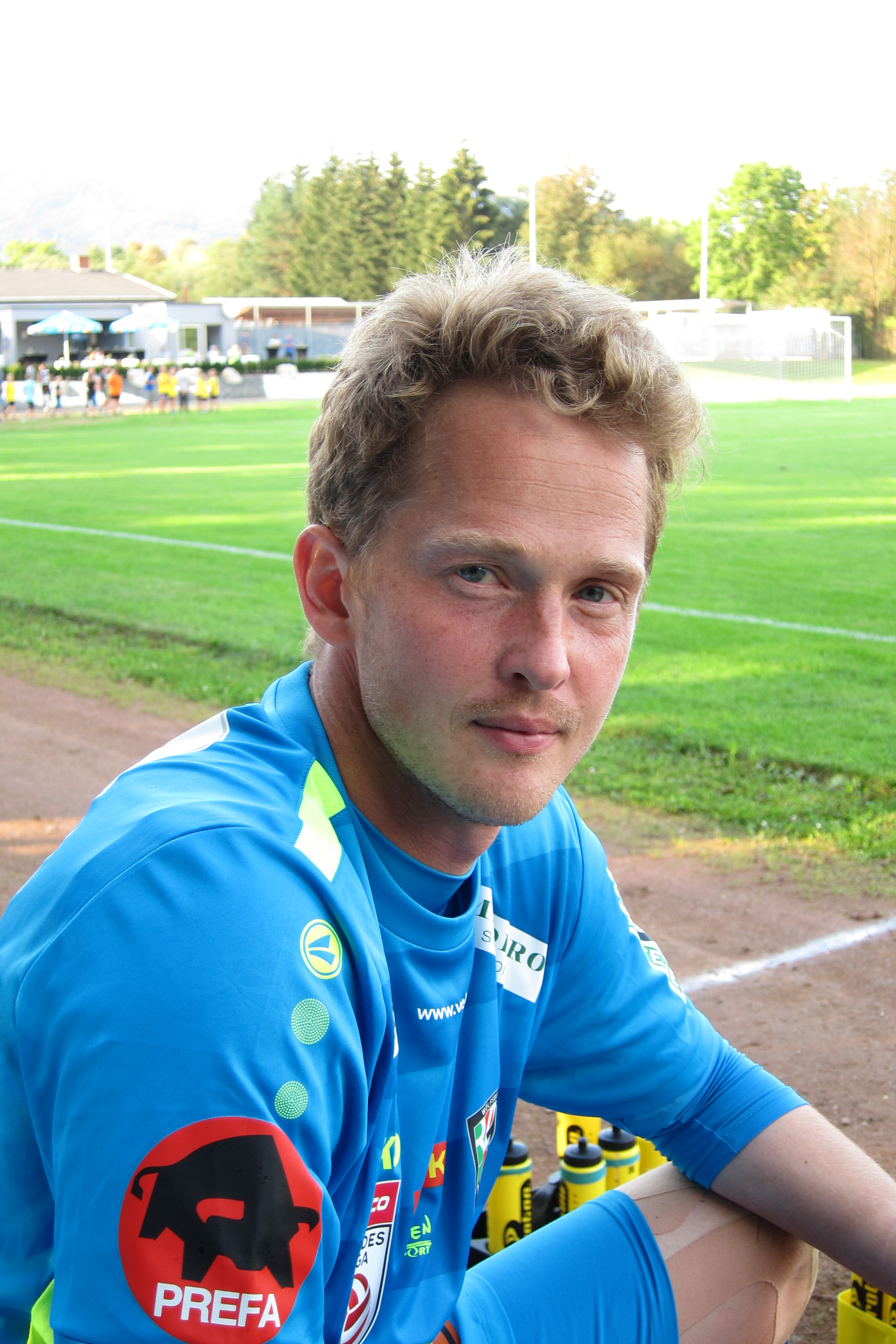 Christian Dobnik (WAC)